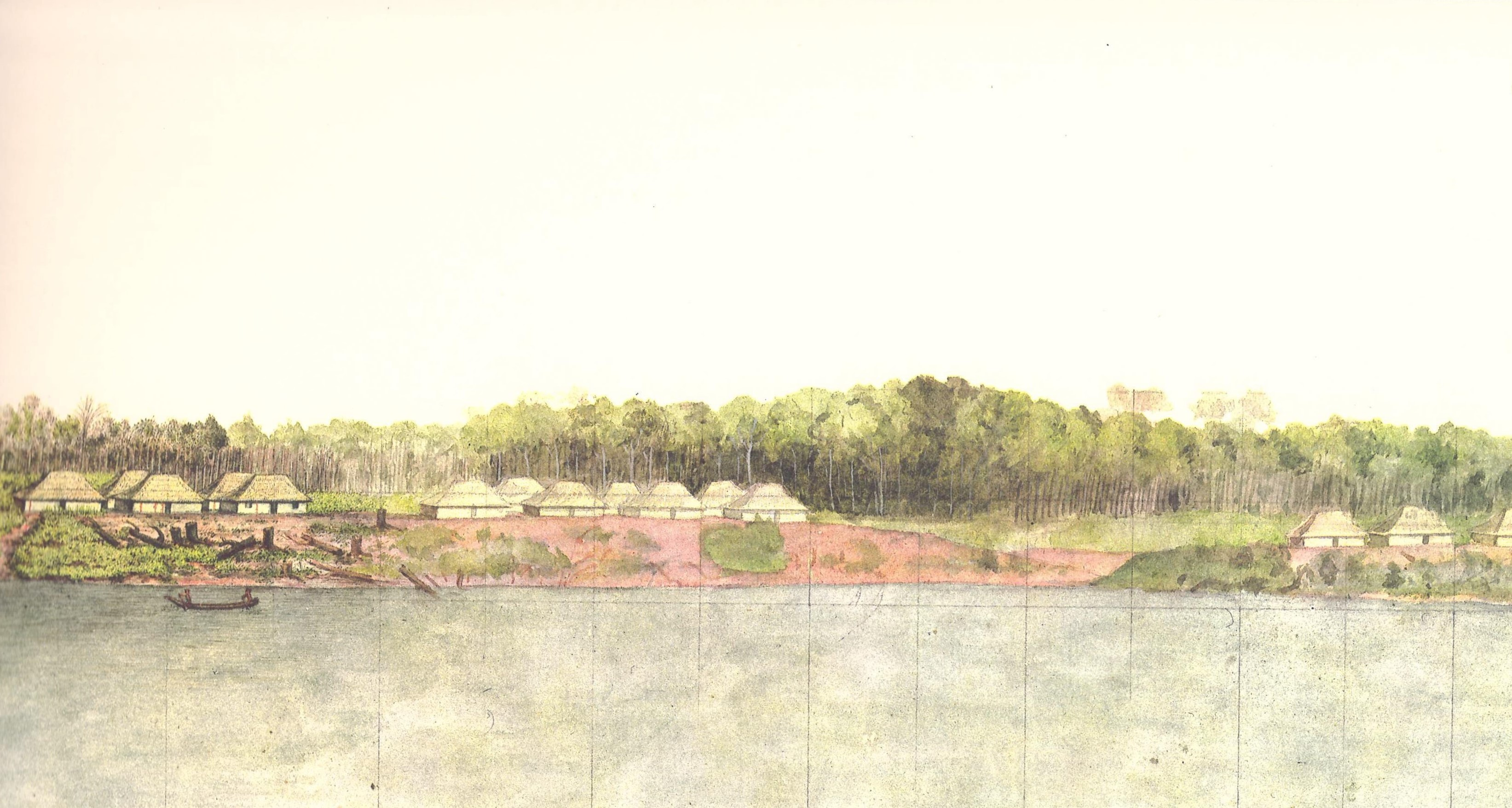 Ilustração em Viagem Filosófica pelas capitanias do Grão Pará, Rio Negro, Mato Grosso e Cuiabá.